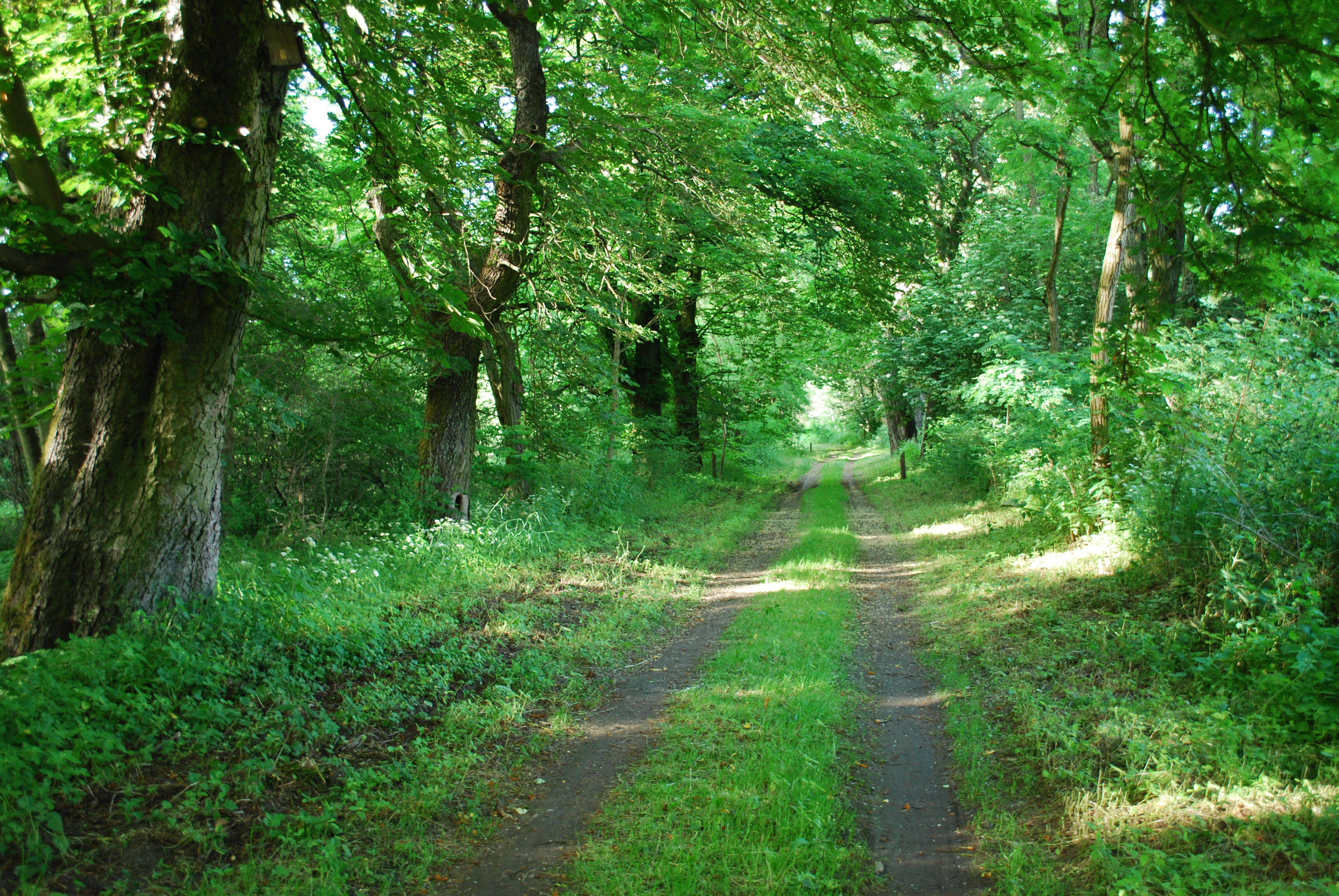 Allee mit Kastanien in Richtung der Wüstung Ferbitz